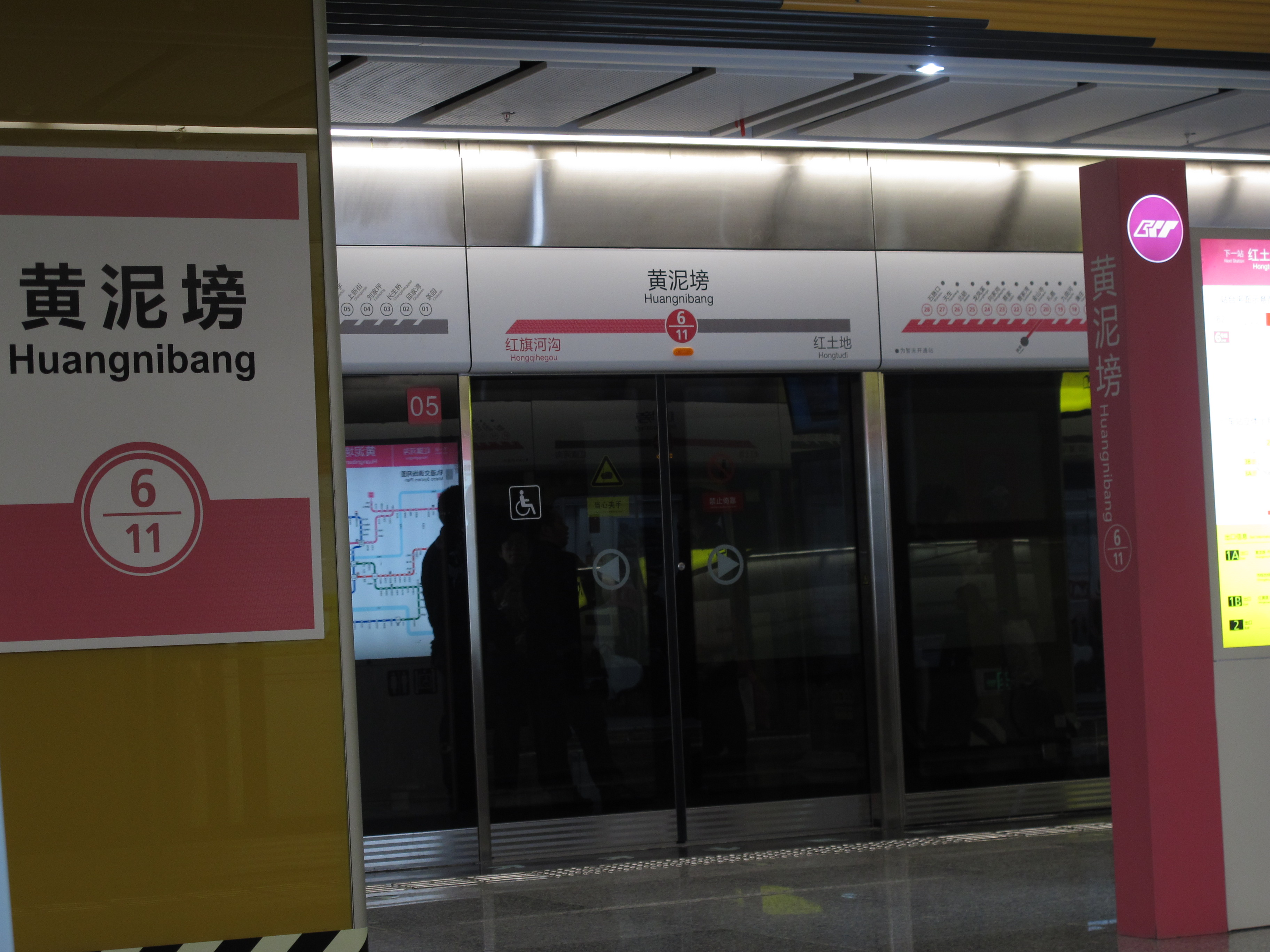 重庆轨道交通六号线黄泥磅站